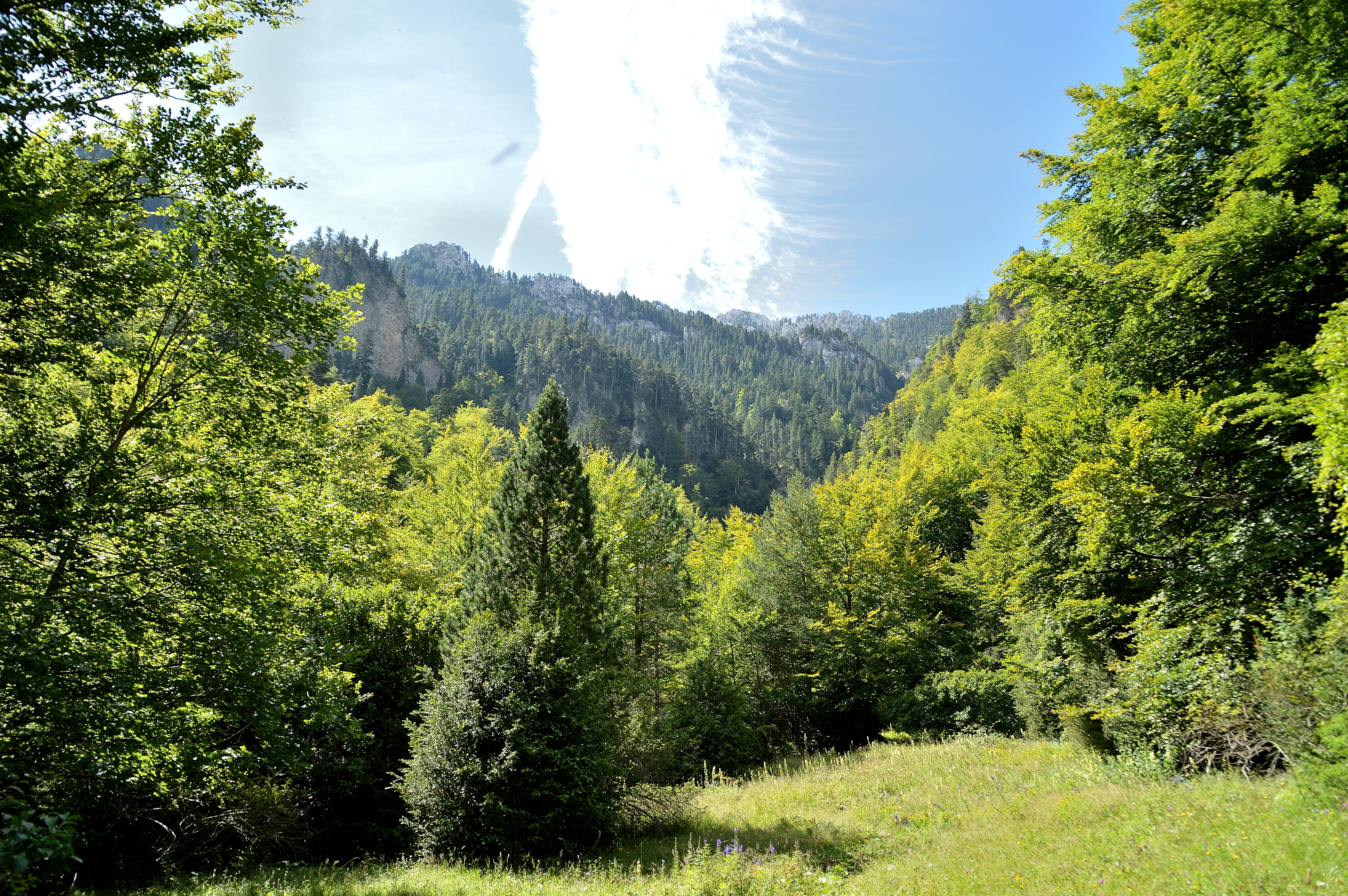 Bosc de les Molleres de Gresolet, mirant en direcció oest, Parc Natural Cadí-Moixeró, comarca del Berguedà, municipi de Saldes This is a photography of a Site of Community Importance in Spain with the ID: ES0000018. Natura2000 entry, EEA entry